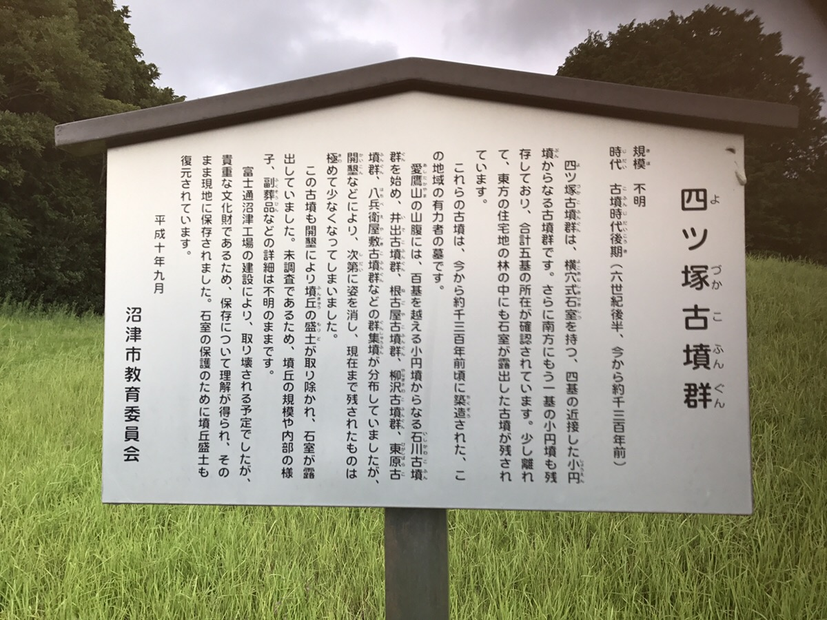 静岡県沼津市にある四ツ塚古墳の説明看板